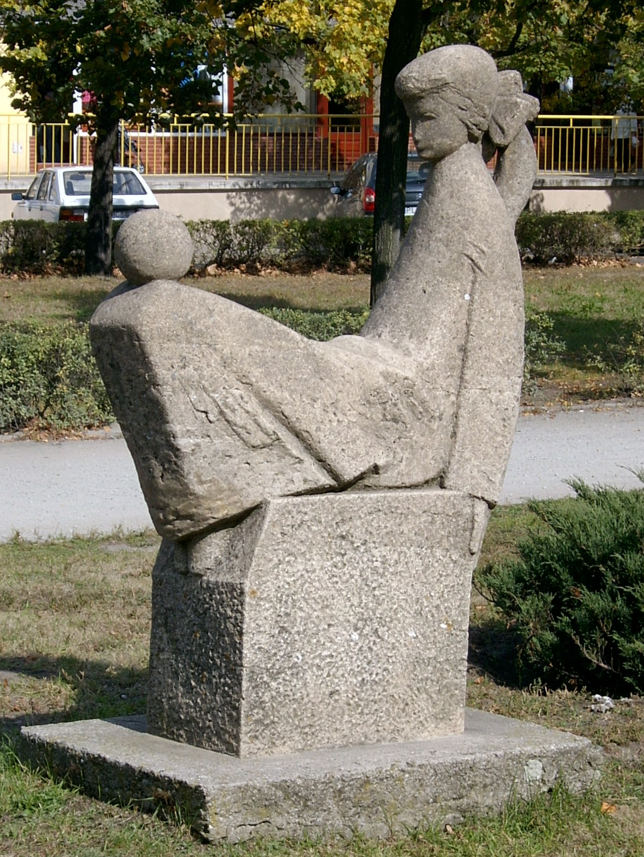 Bohaterów Westerplatte w Lesznie Park im. J.Jonstona, rzeźba "Kasia" projektu Antoniego Szulca (1976).